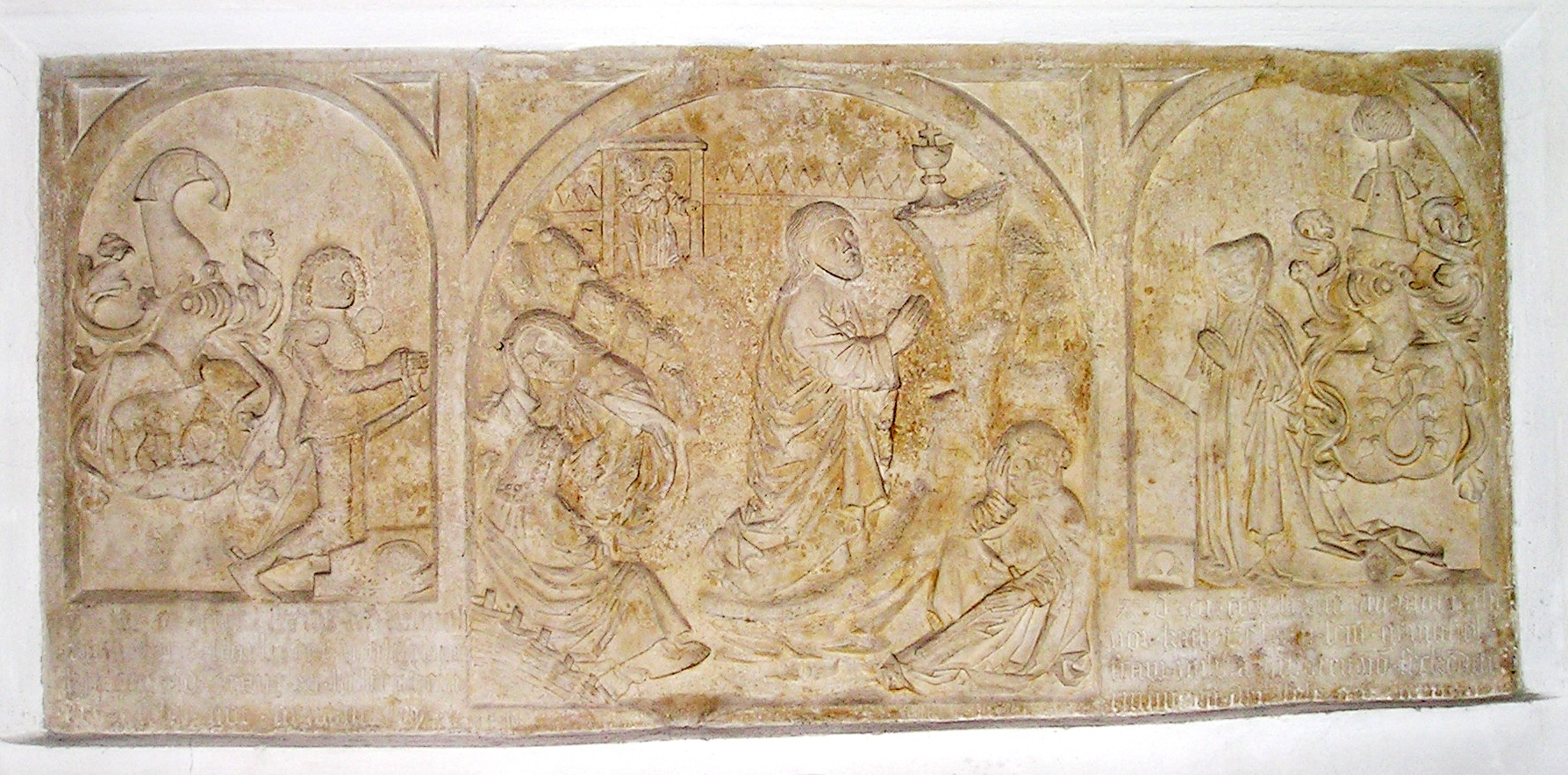 Wellheim, Landkreis Eichstätt; Kirche St. Andreas, Epitaph für Konrad von Helfenstein und seine Gemahlin Ursula geb. von Seckendorf